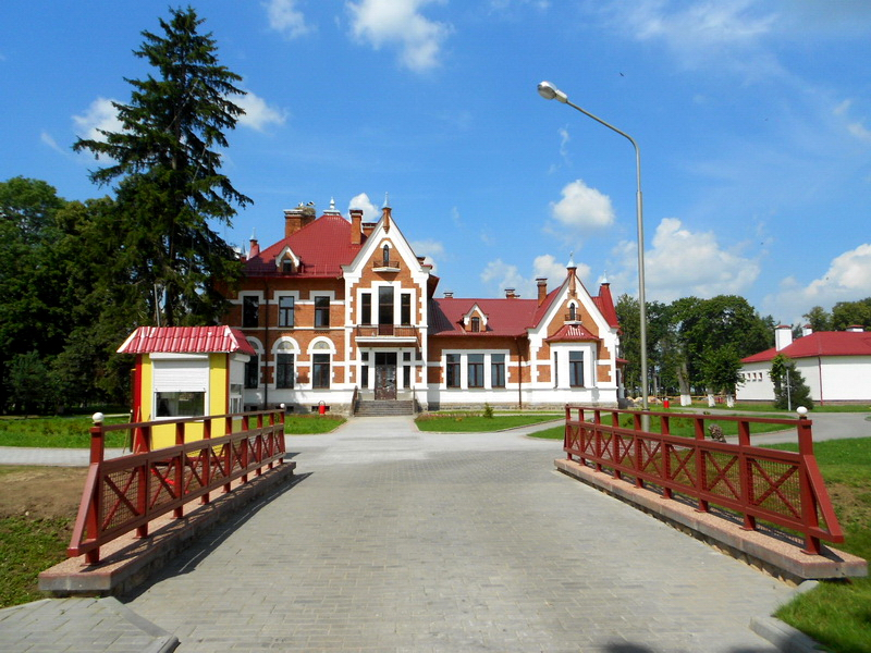 Галавічполе. Сядзіба Іваноўскіх